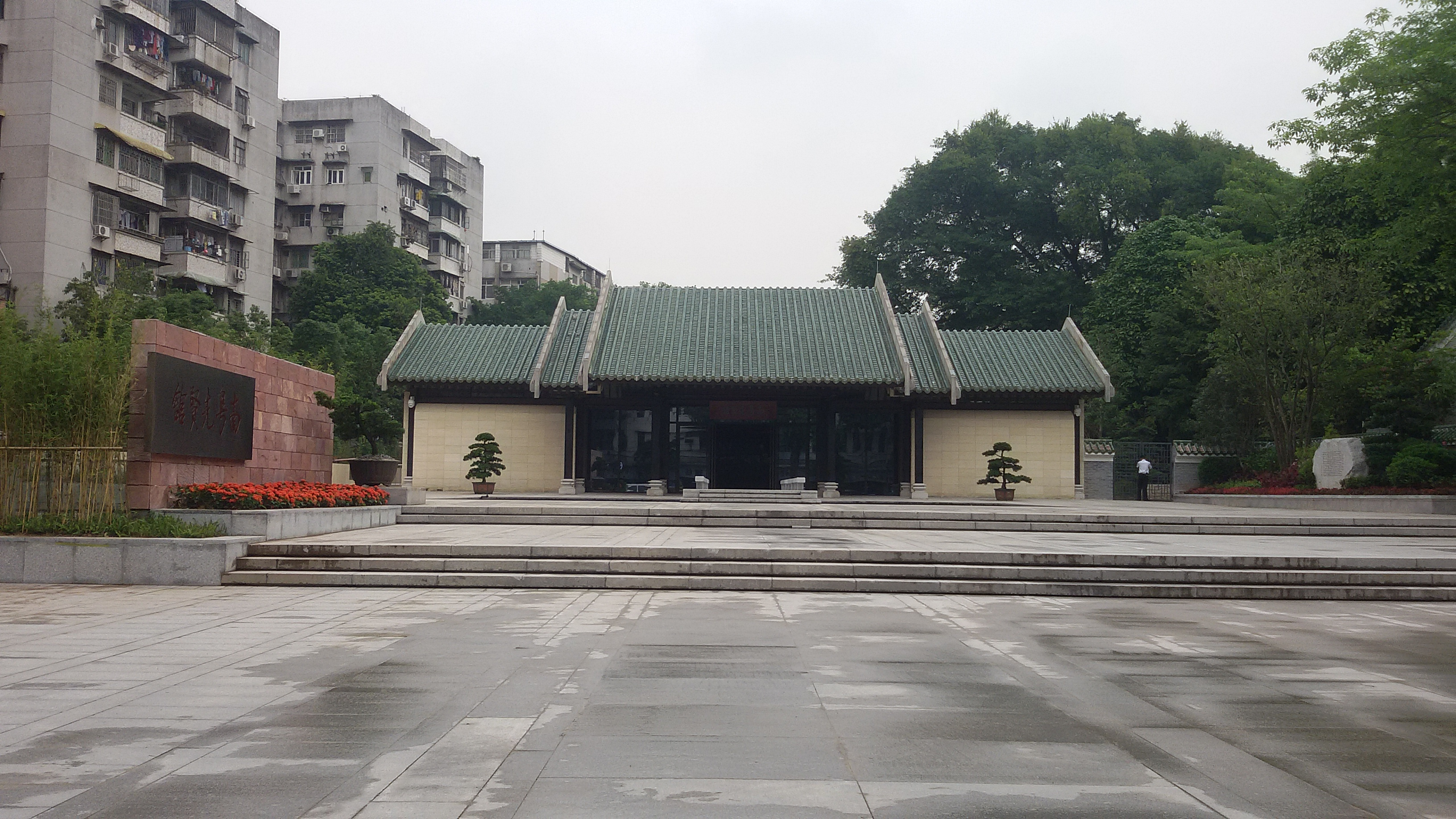 粵語: 南粵先賢館